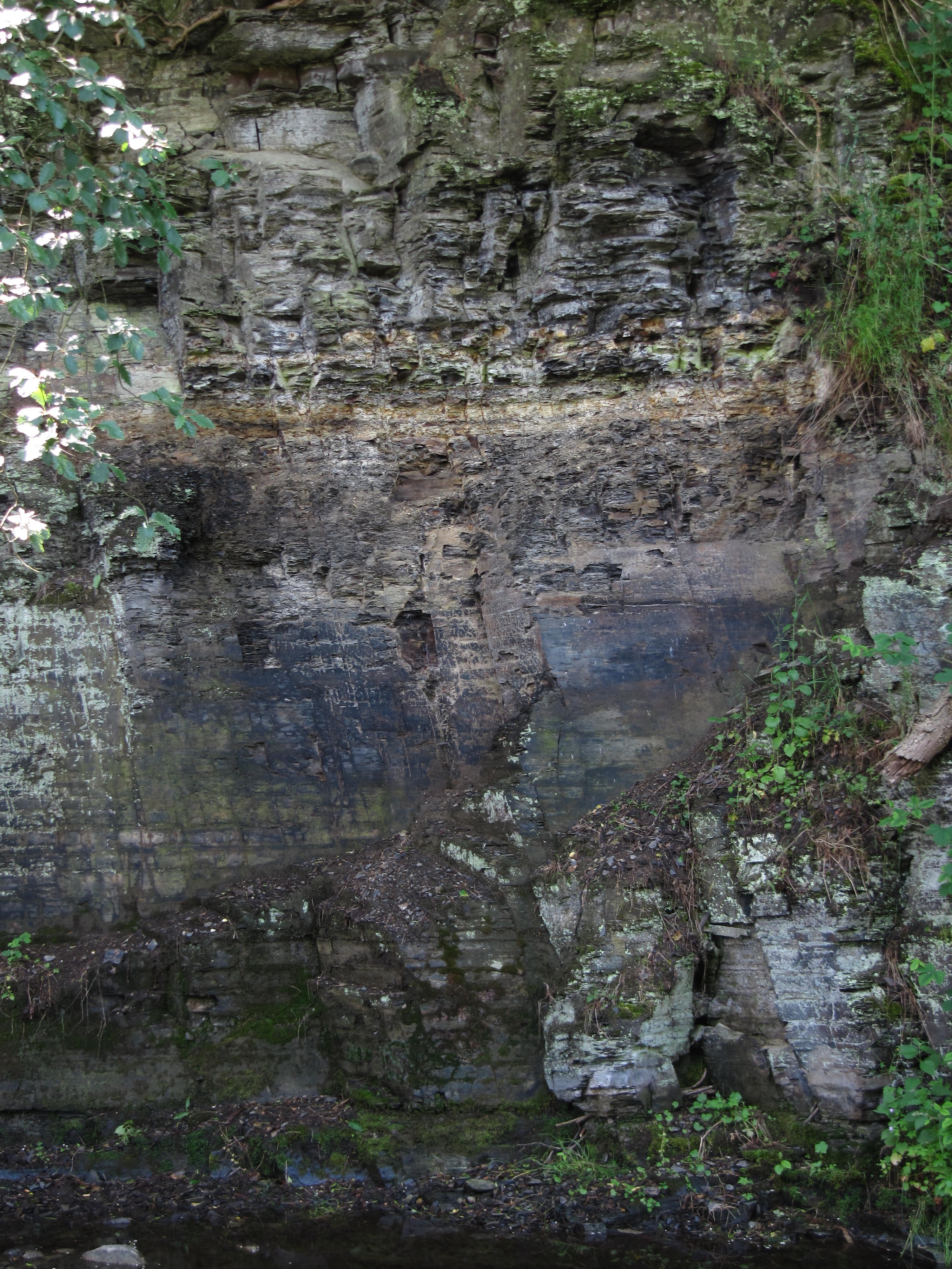 Grænsen mellem de Sen-Ordoviciske Jerrestad Fm øverst og Dicellograptus-skifer nederst markeret ved de tynde gule lag ca. en trediedel fra toppen; Læså ved Vasegaard.